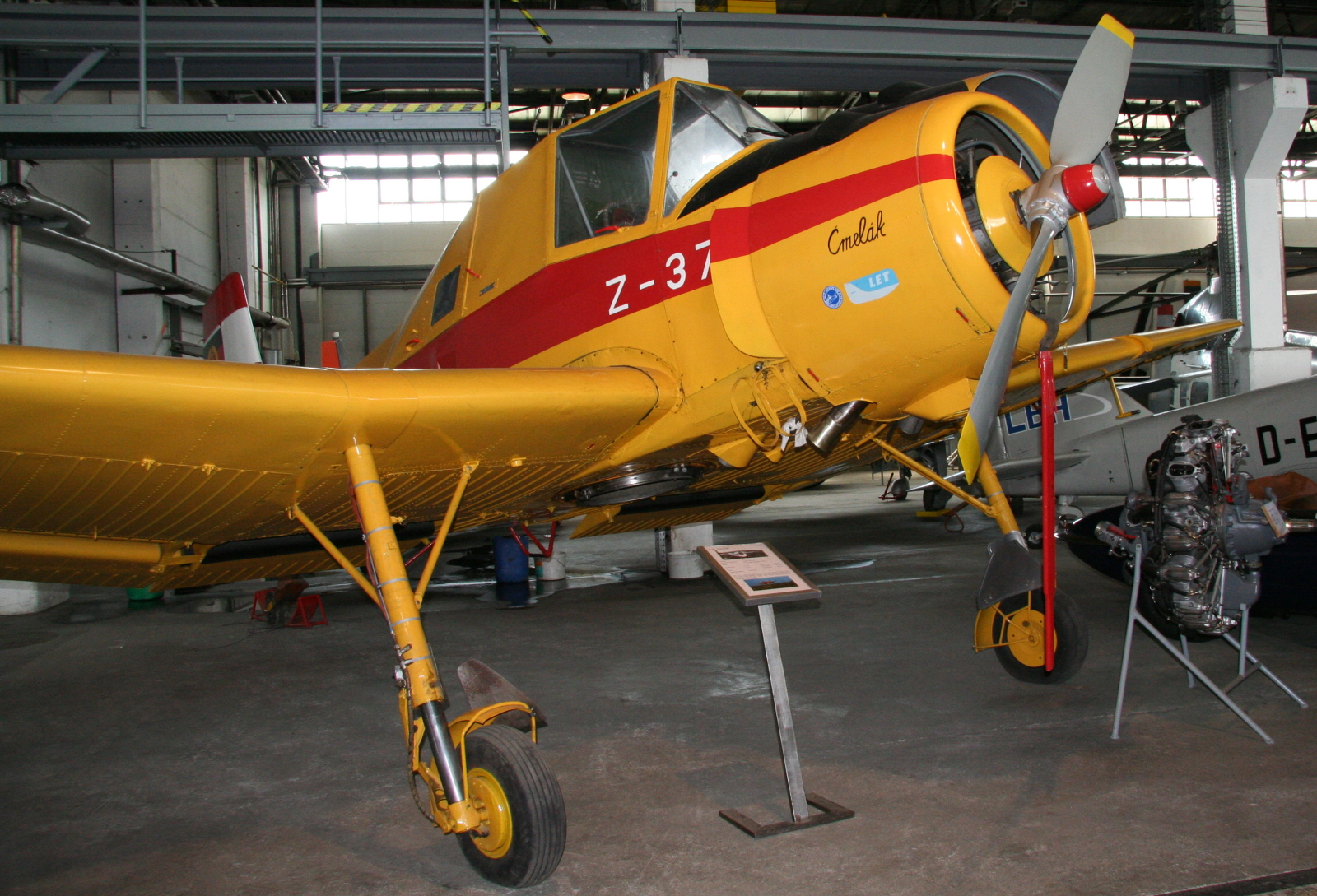 LET Z-37 im Museum für Luftfahrt und Technik in Wernigerode